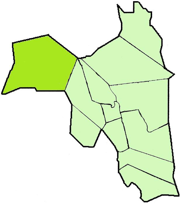 Lapinjärven kartta: Porlammin sijainti